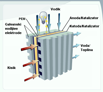 Goriva ćelija s polimernom membranom ako elektrolitom